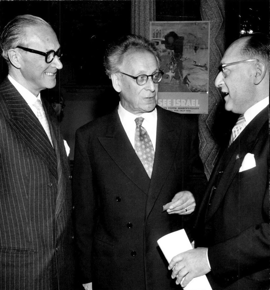 Staten Israels 10-årsjubileum högtidlighölls i Blå hallen i Stockholm på söndagskvällen. Hallen, som smyckats med Israels och Sveriges flaggor, var gott och väl fullsatt när professor Hugo Osvald, som är ordförande i samfundet Sverige–Israel, läste upp ett telegram från president Ben Zvi och tolkade en proklamation från premiärminister Ben-Gurion, som skissade på ett nytt 10-årsprogram.På bilden ses riksdagsman Erik Hagberg, professor Hugo Valentin och Israels minister dr Chaim Yahil i samspråk.